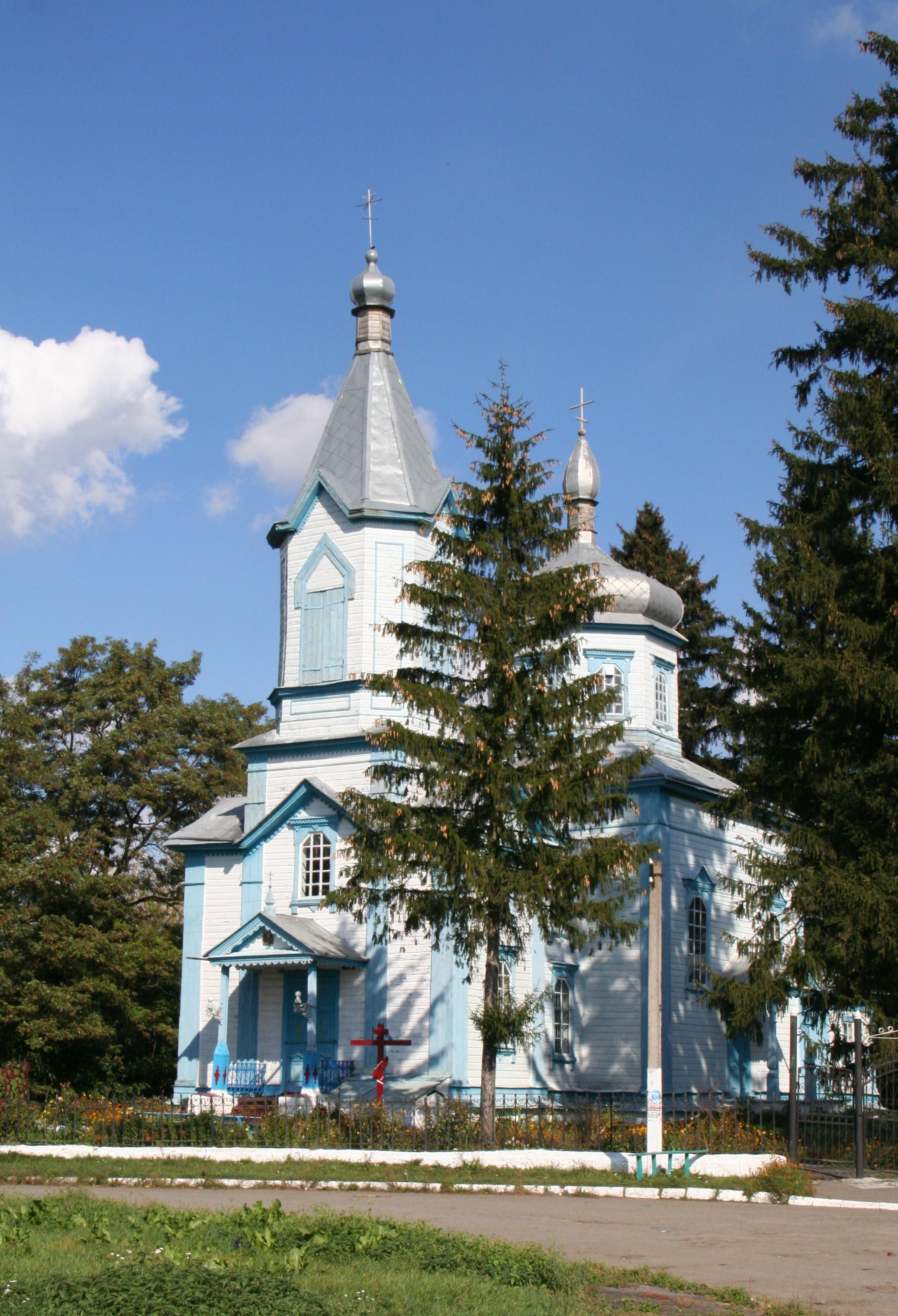 Дерв*яна церква в с.Никонівка, Бердичівський район, 2012р.